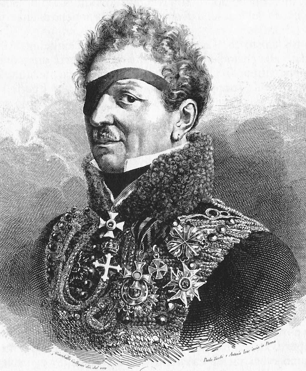 ritratto di Adam Albert Graf Neipperg, secondo marito di Maria Luigia d'Austria (incisione - 1820 circa) Museo Glauco Lombardi - Parma